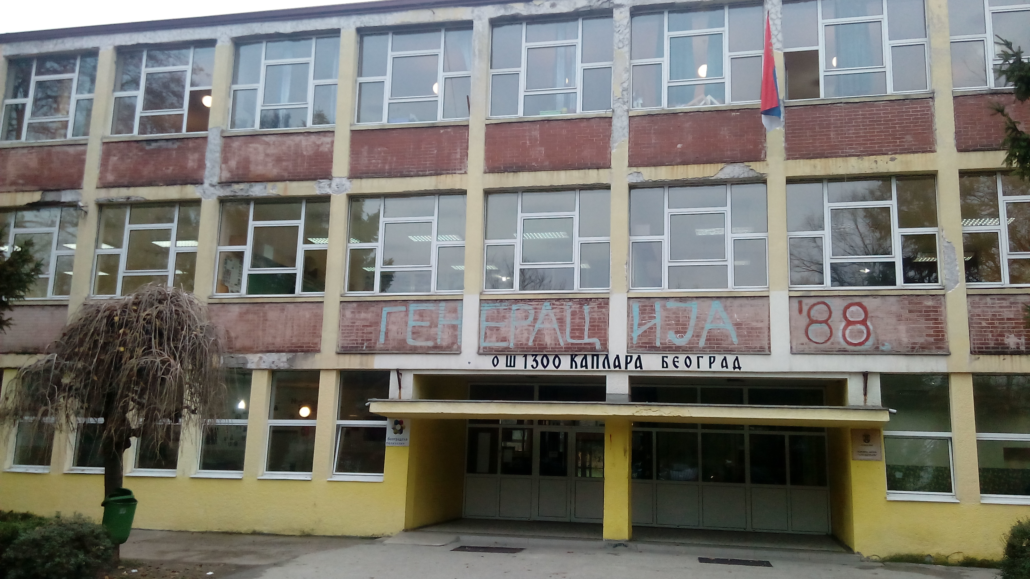 skola